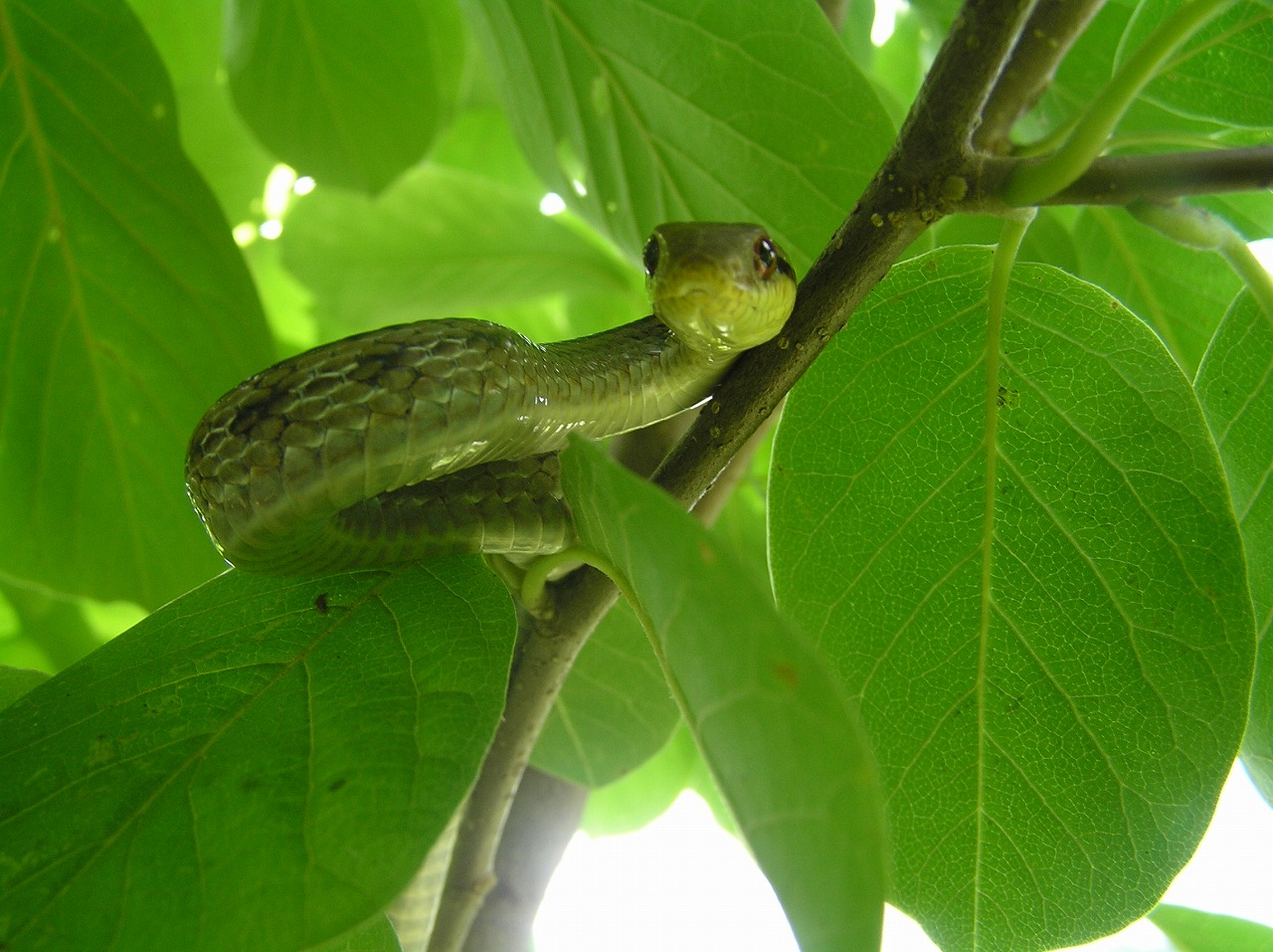 モクレンの木に登るアオダイショウ